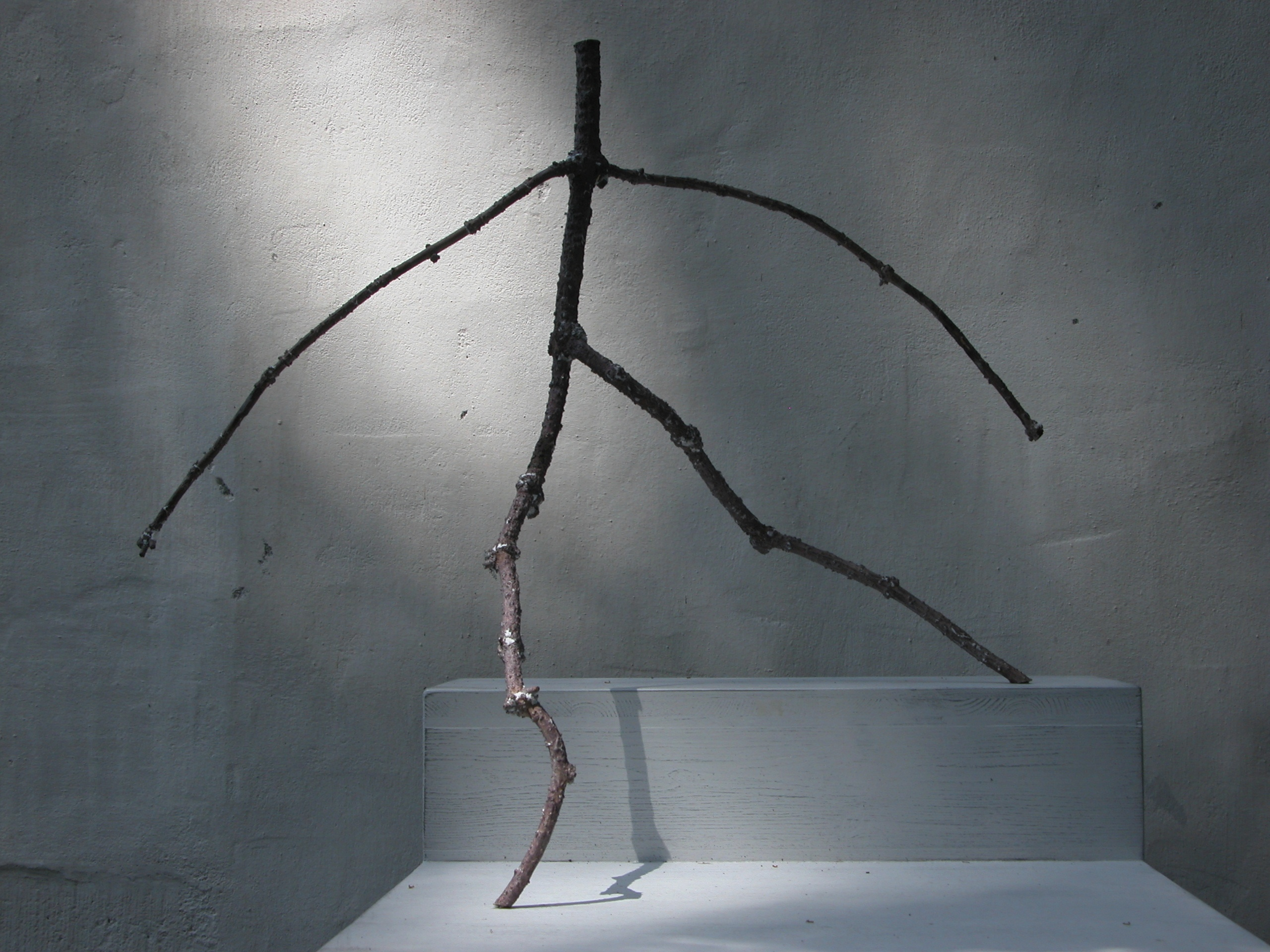 Eine der vielen Baumfiguren, die seit 2003 entstanden sind. Ganz gezielt sucht der Künstler Busch- und Baumverästelungen nach Formen ab, die er – um 180 Grad gedreht – zu Figuren umwandeln kann.